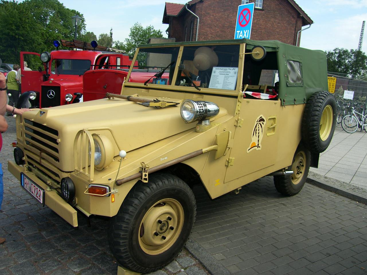 Horch P3 Geländewagen (IFA-Produktion)